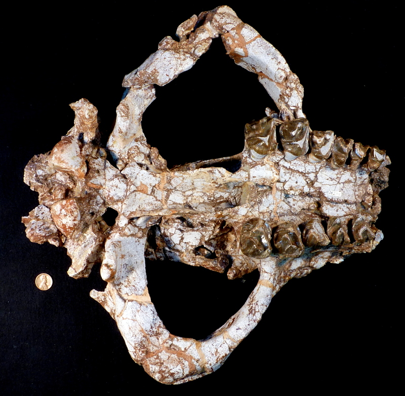 cráneo de Coryphodon